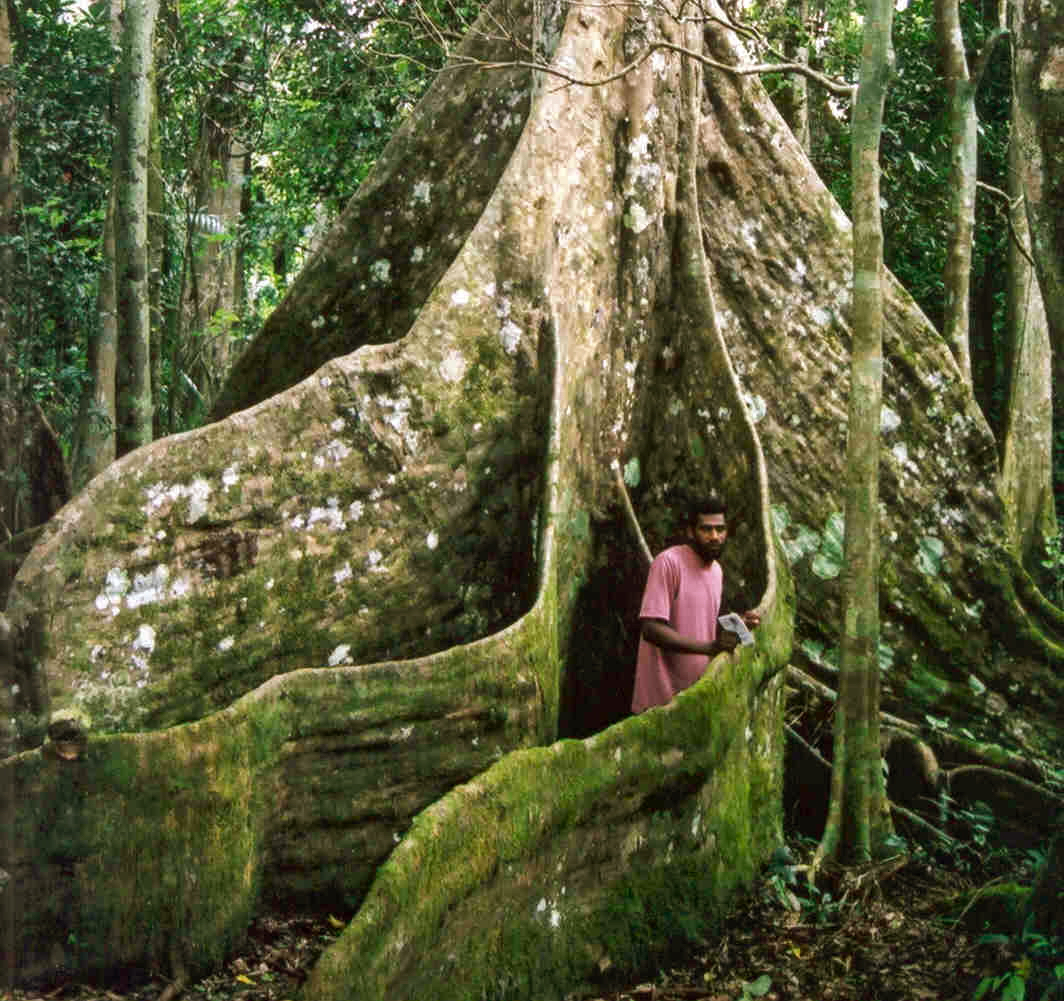 Dracontomelon vitiense — Nakatambol. Vatthe Conservation Park, Espiritu Santo, Vanuatu. Un arbre de fruits tropicaux sous-utilisés.